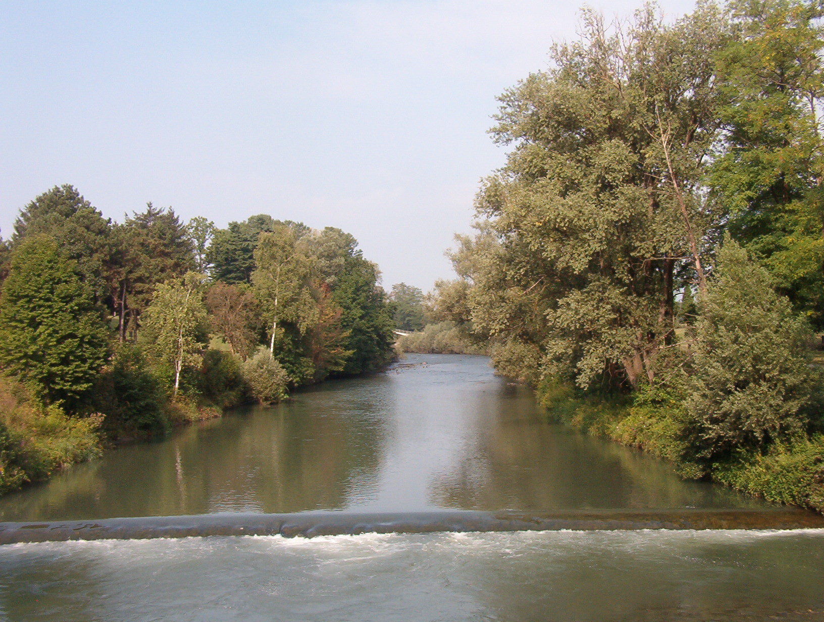 Fiume Dora Riparia attraversa il parco della Pellerina a Torino - Italia